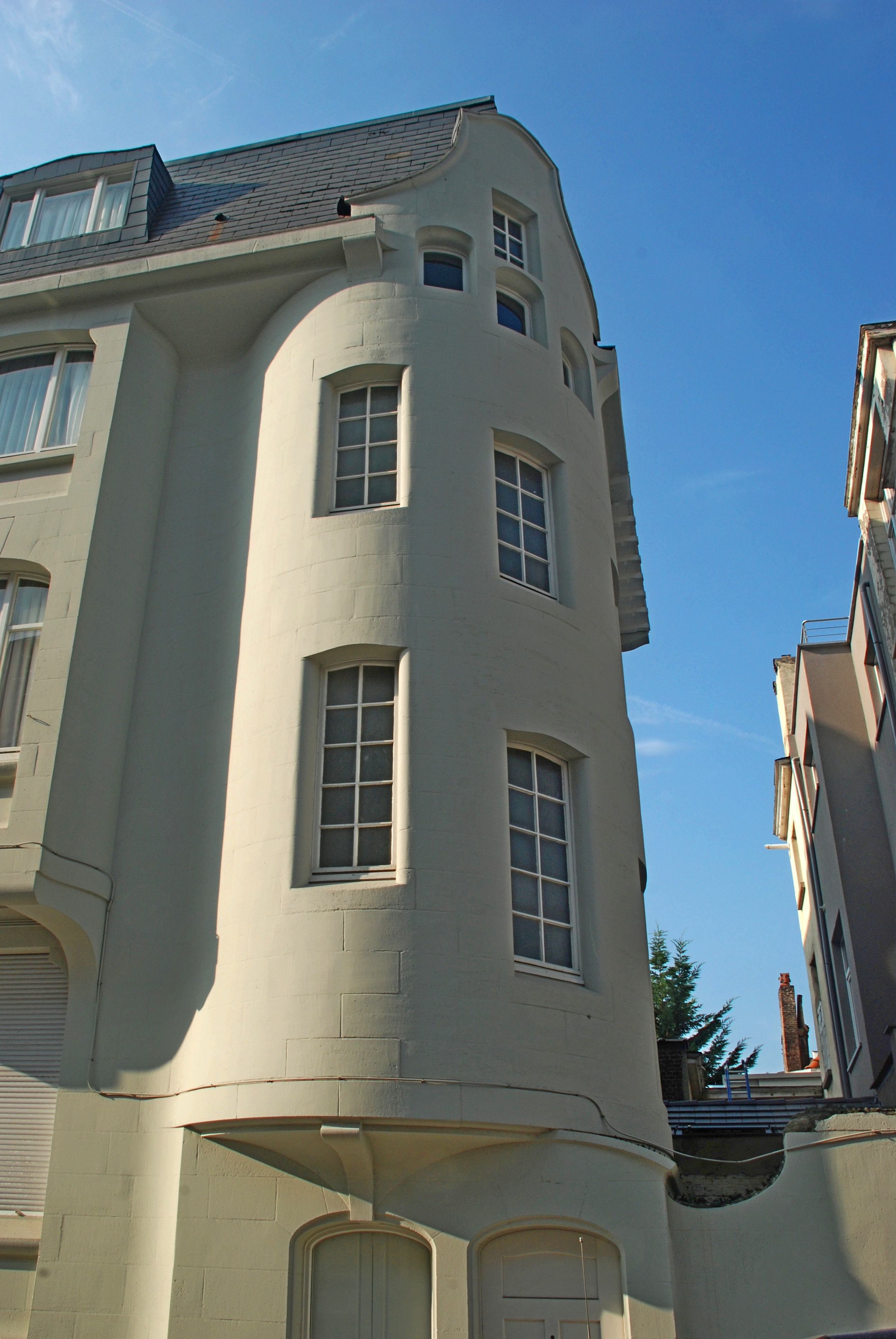 Belgique - Bruxelles - Maison Van Rysselberghe